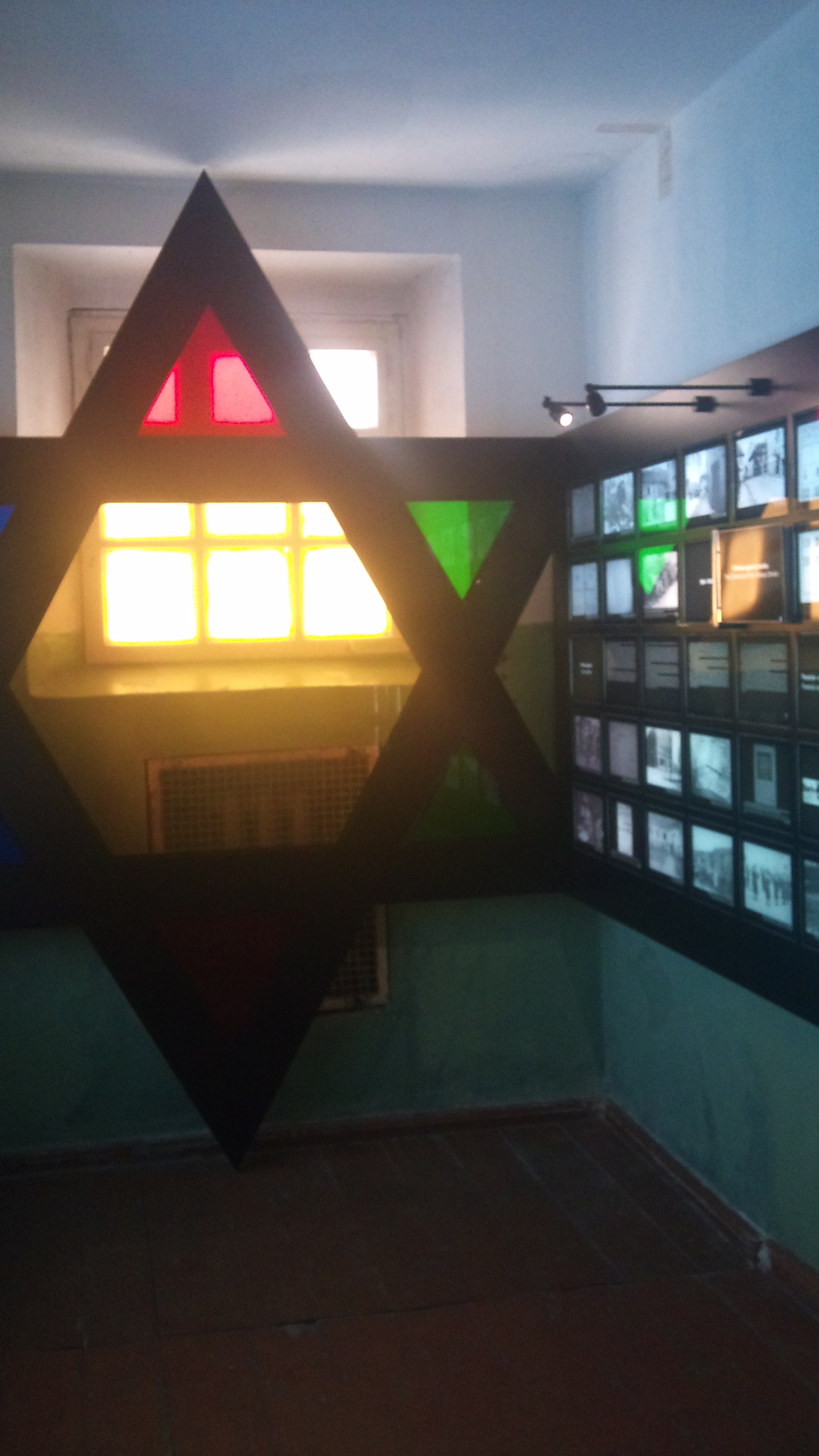 Музей жертв геноцида (Вильнюс). Эспозиция посвящённая Холокосту